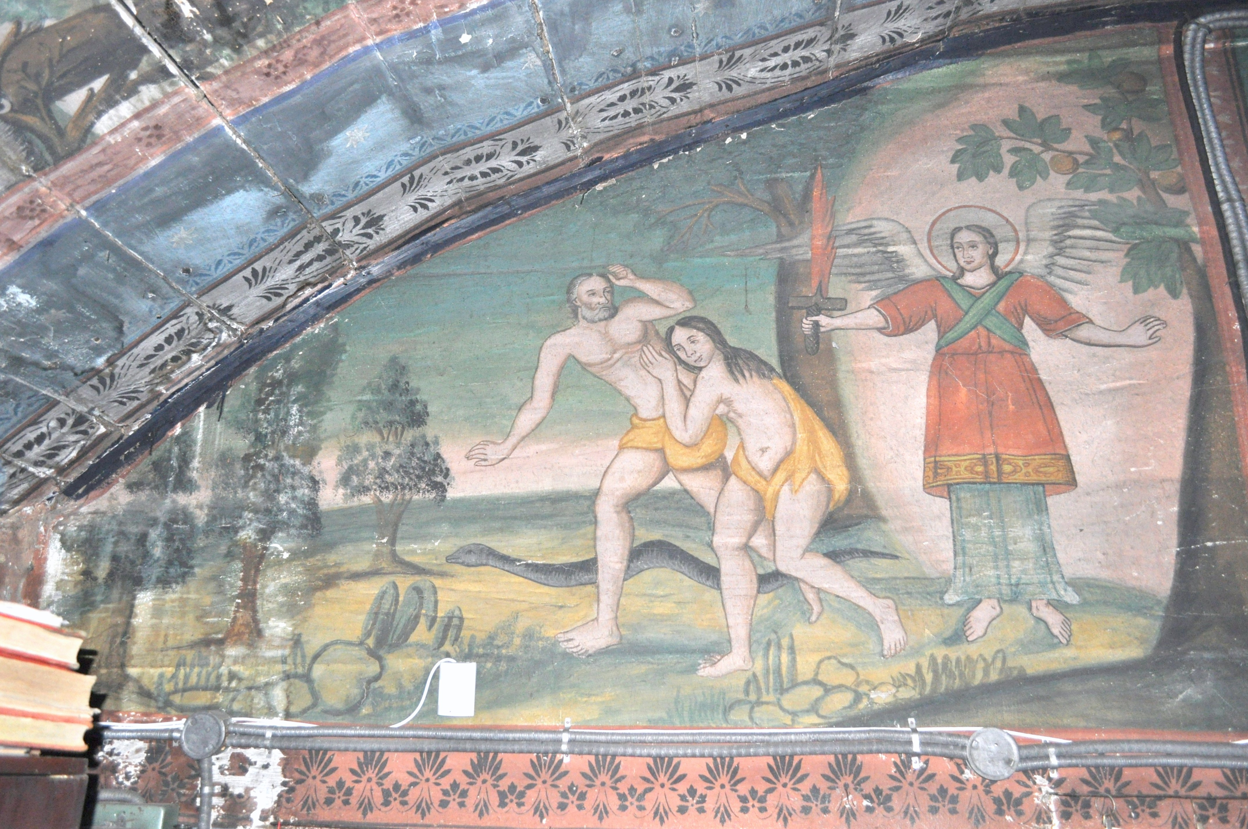 Biserica de lemn "Buna Vestire" din Ciungani, județul Hunedoara